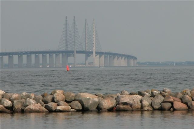 Øresundbroen set fra Dragør